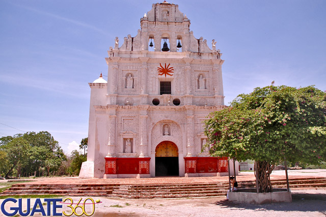 Patrimonio cultural y nacional.